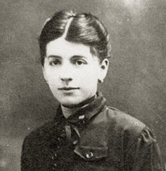 Julie Wohryzková (1891-1944), snoubenkou Franze Kafky